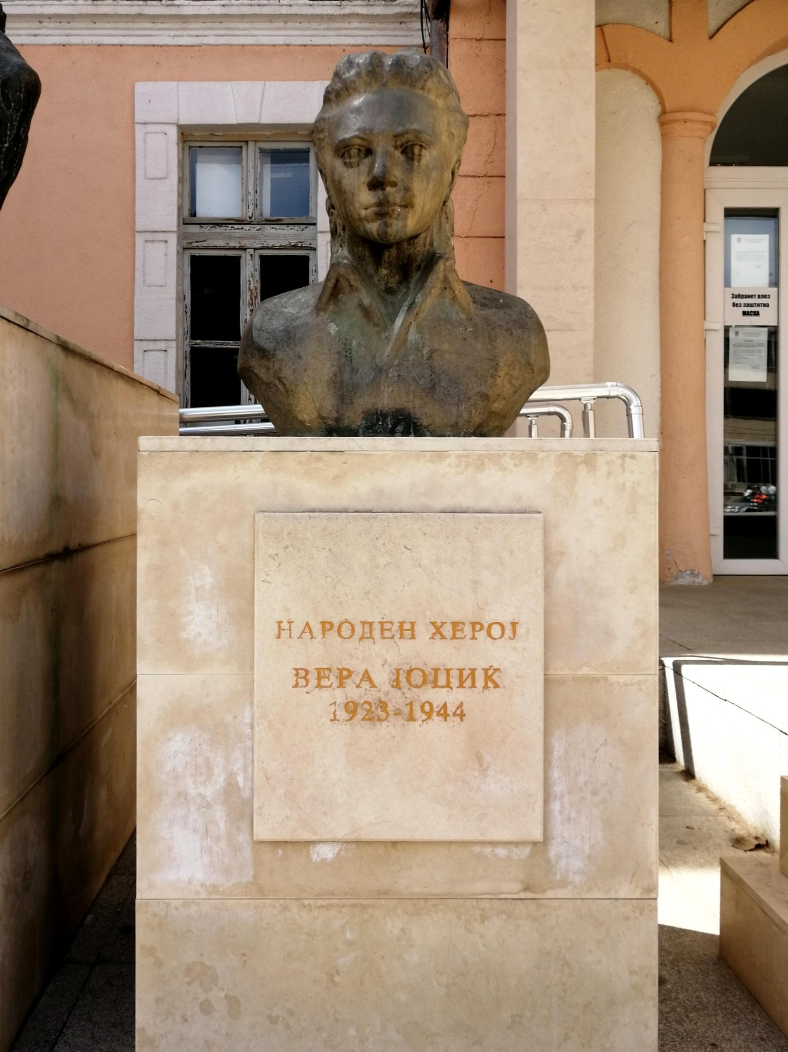 Биста на Вера Јоциќ во Крива Паланка